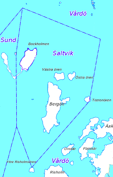 Saltviks exklav mellan Sund och Vårdö. Exklaven ligger drygt 4 km sydväst om huvuddelen av Saltviks kommun. Bockholmen är även den en exklav som tillhör Vårdö.